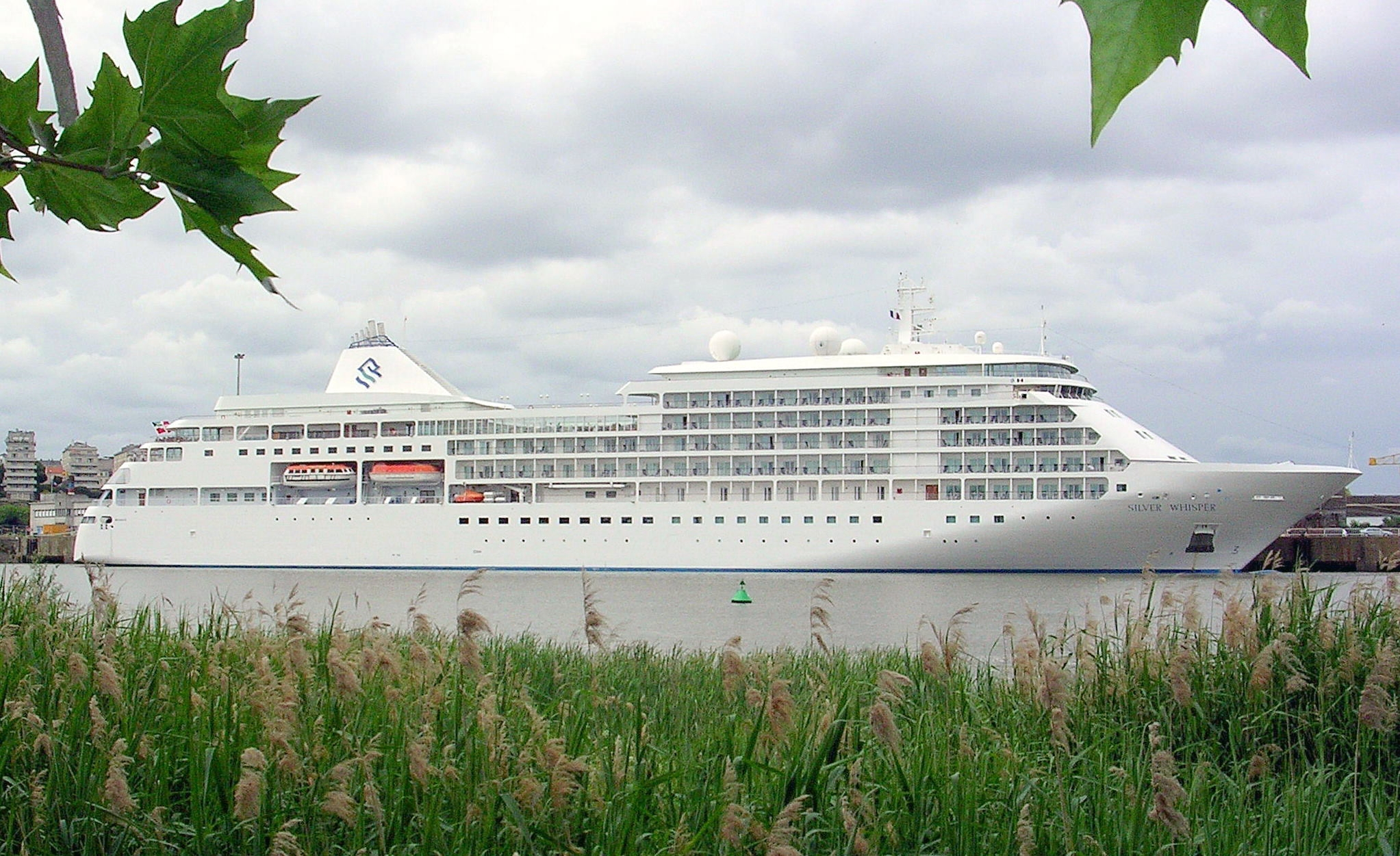 Paquebot Silver Whisper en escale à nantes quai Wilson le 05 juin 2005. Photo prise de Trentemoult.